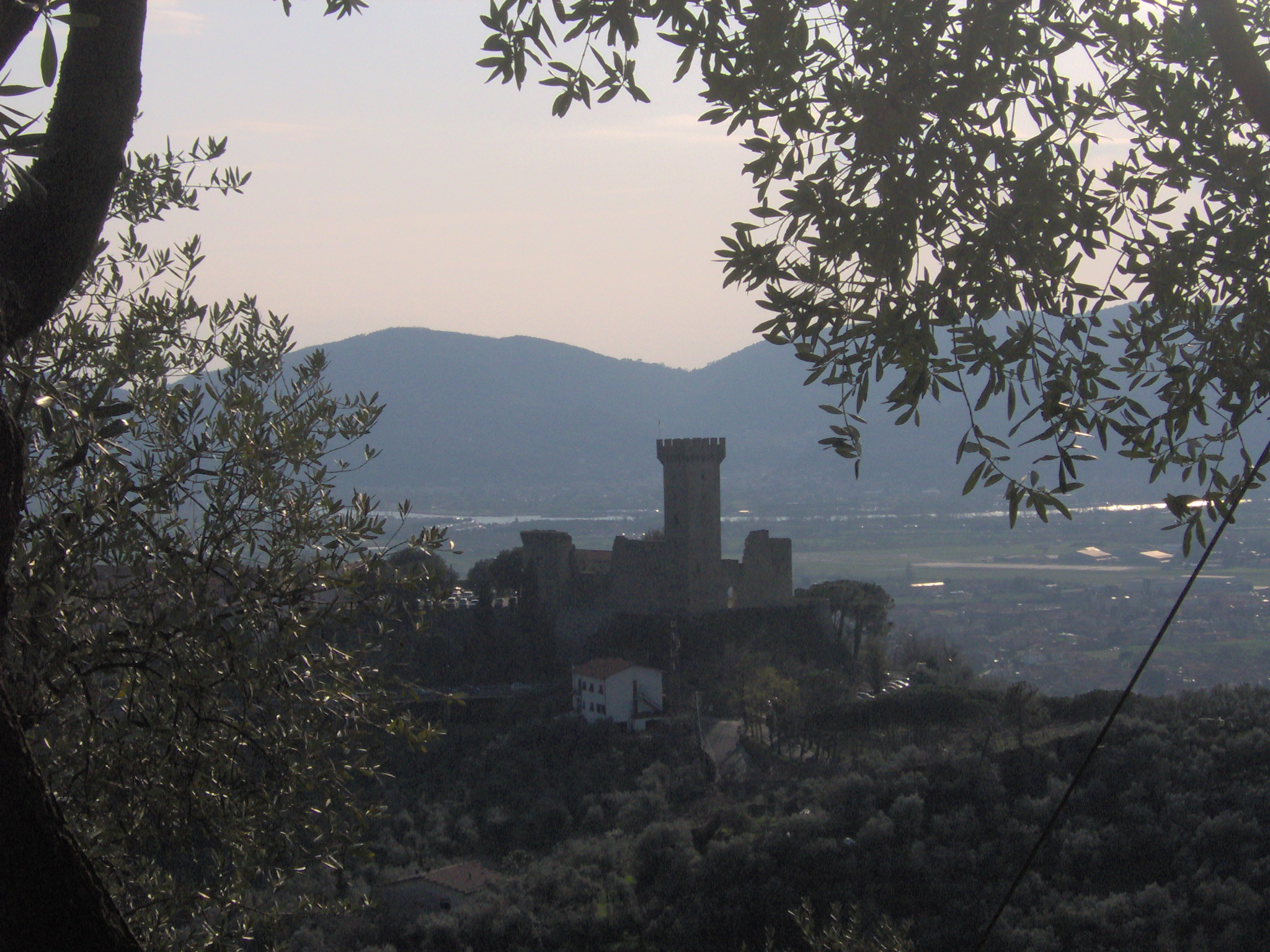 Castelnuovo Magra - Il castello visto dalla collina adiacente